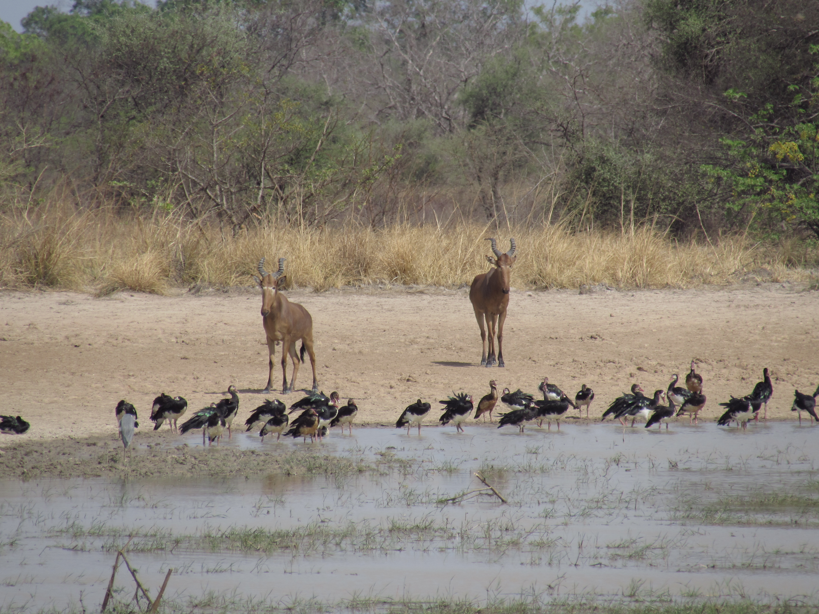 nationalpark pendjari - kuhantilopen am mare bali